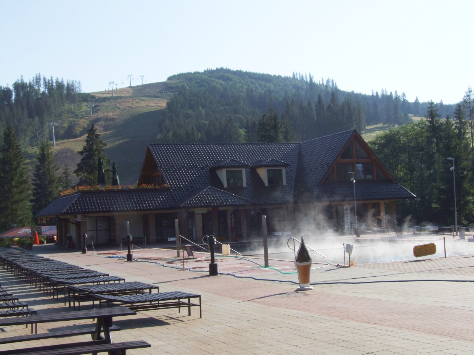 Oravice (Slovakia)